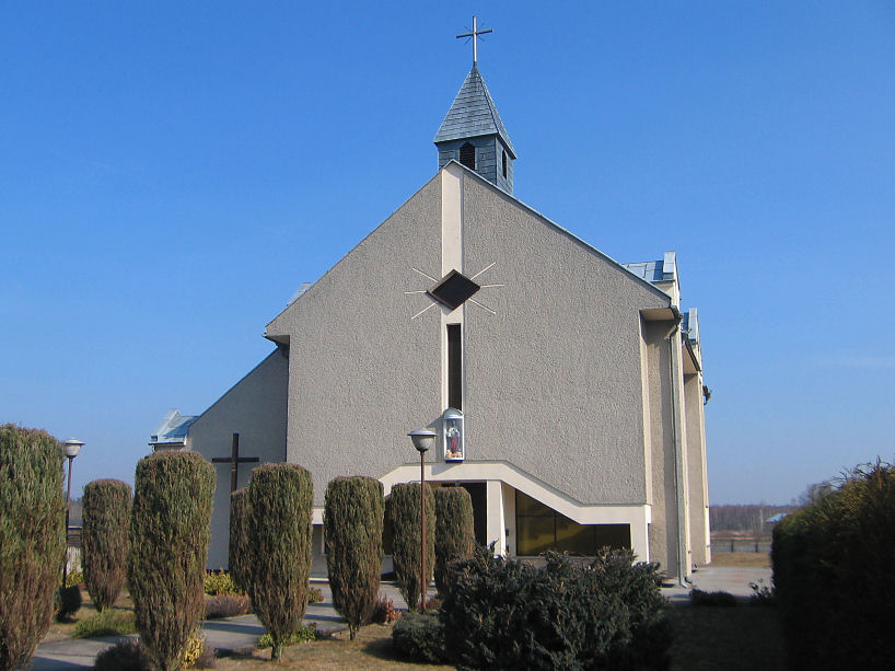 Kościół filialny Najświętszego Serca Pana Jezusa w Kaniowie (gmina Popielów)